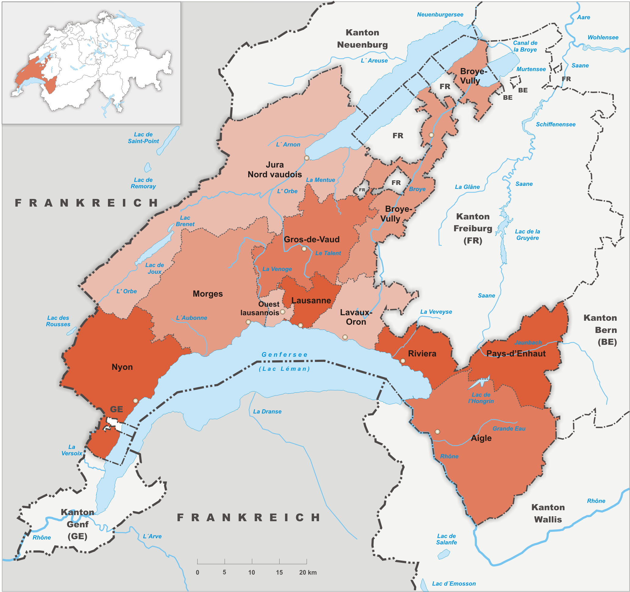 Bezirke des Kanton Waadt.